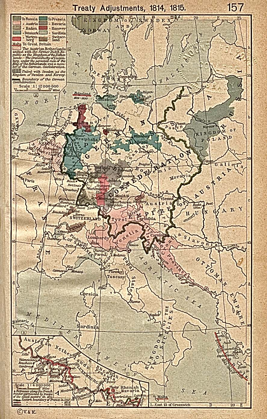 Da: Omlægningen af de europæiske grænser efter Wienerkongressen 1814-15. Indsat: Fæstninger langs den franske front. En: Treaty adjustments 1814-1815. Inset: Fortresses along the French Frontier.